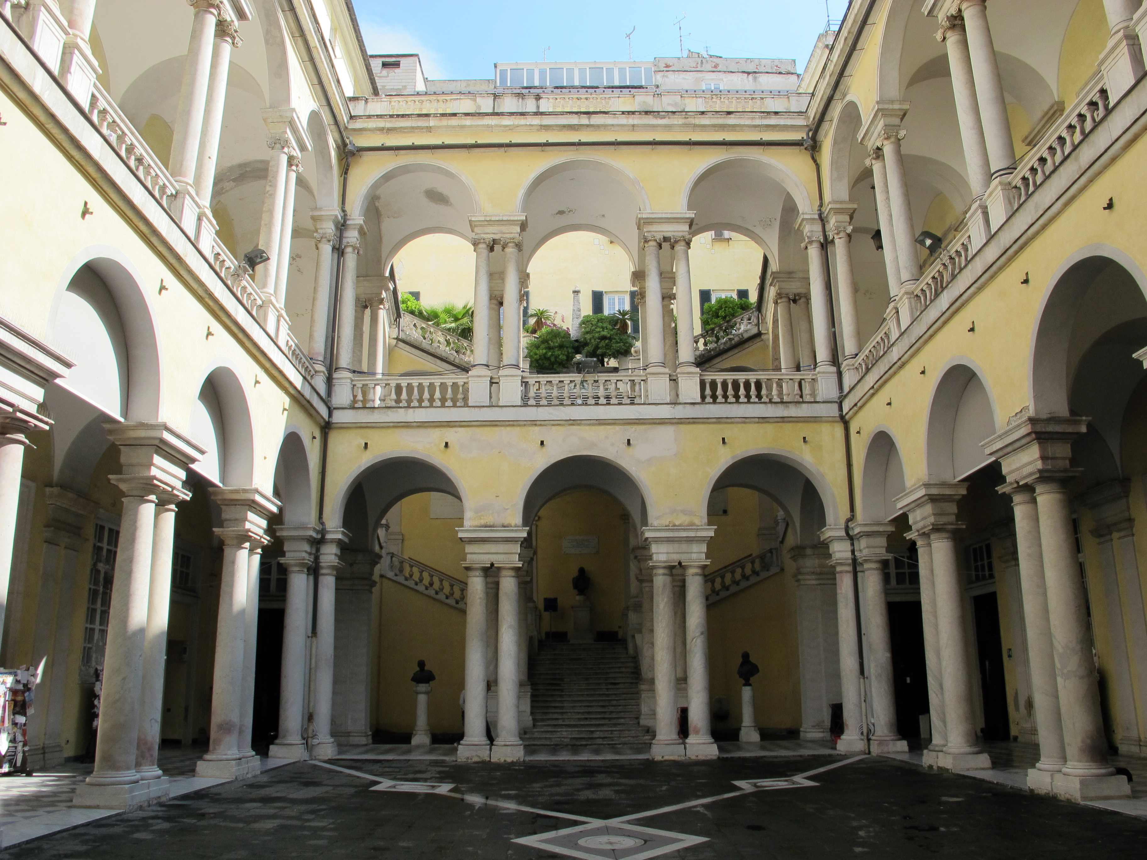 Palazzo dell'Università (Genova)